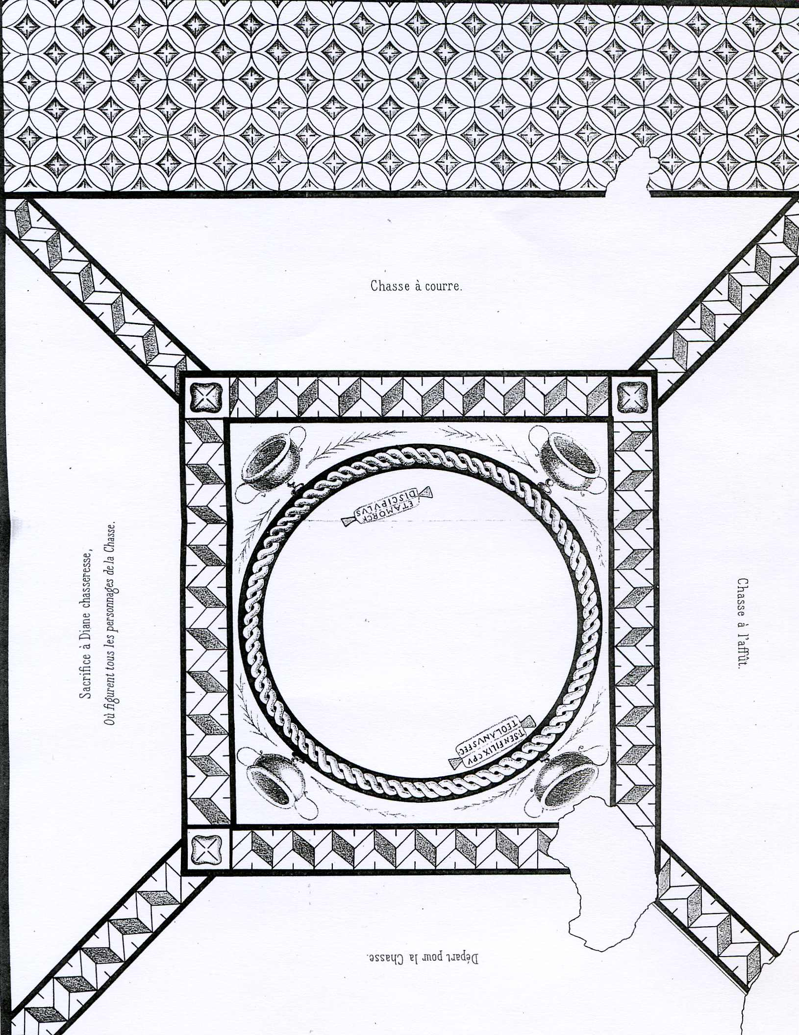 vue générale mosaique de lillebonne